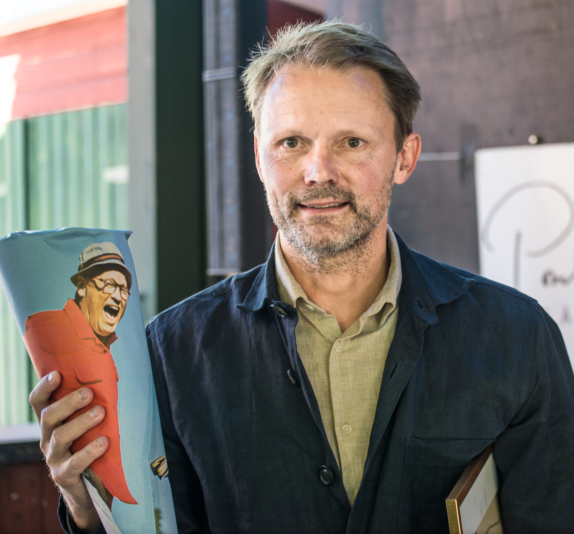 Felix Herngren får KaRAMELodiktstipendiet 2018.